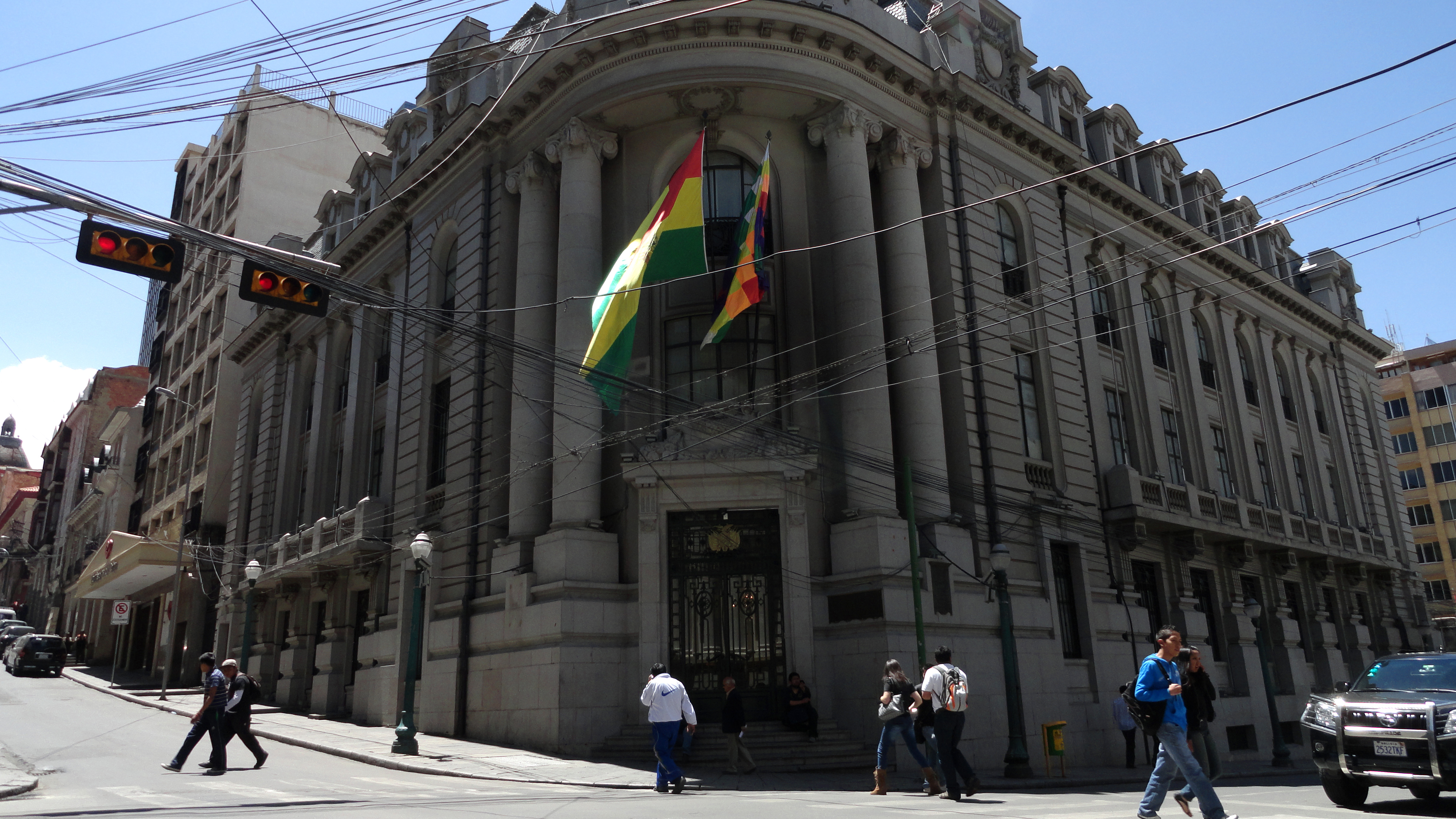 Vicepresidencia del Estado This medium shows the protected monument with the number L/00-095 in Bolivia.